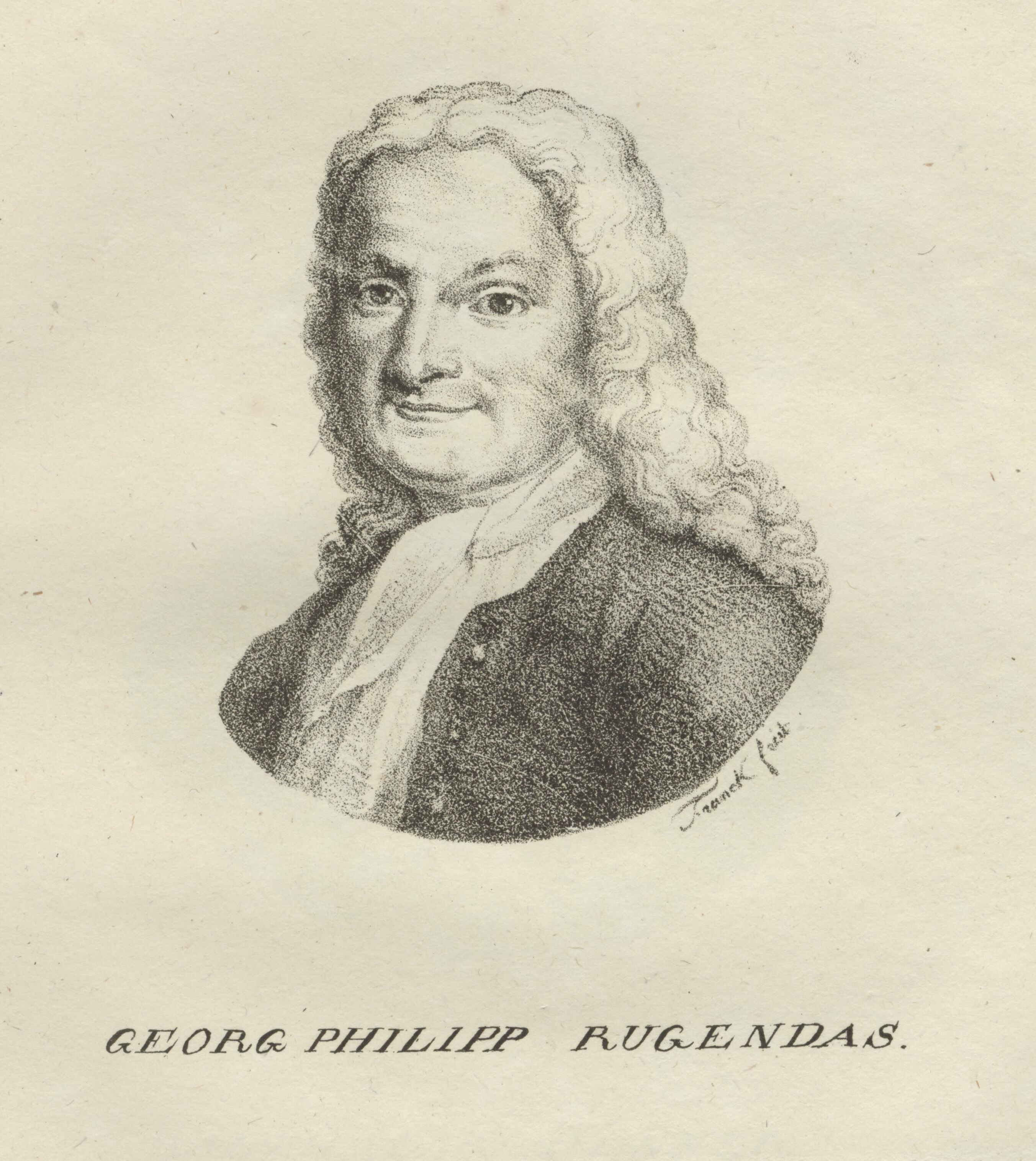 Porträt von Georg Philipp Rugendas